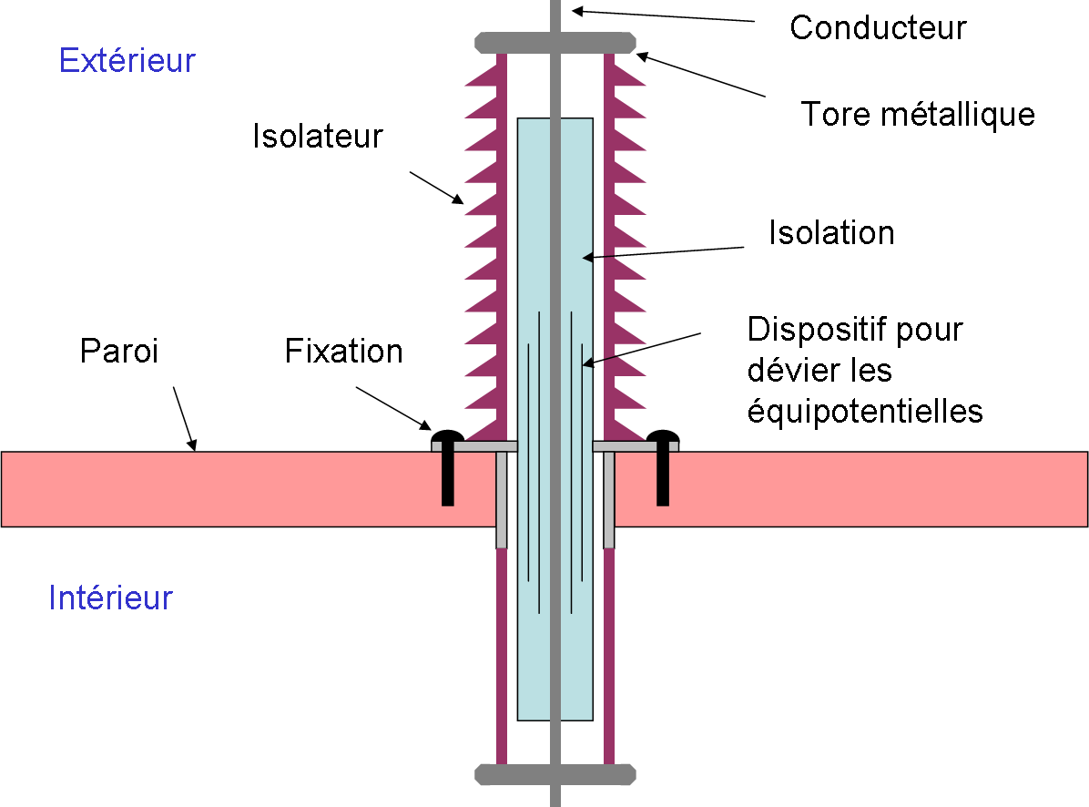 Schéma d'une traversée électrique